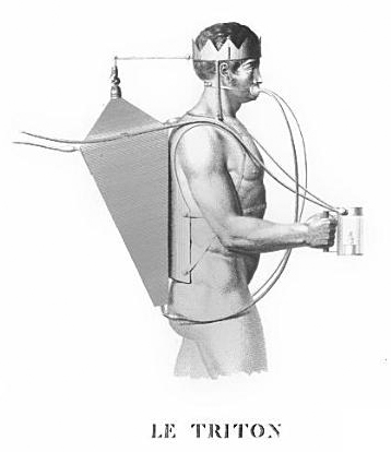 Triton. Ein von Friedrich von Drieberg erfundenes Tauchgerät.